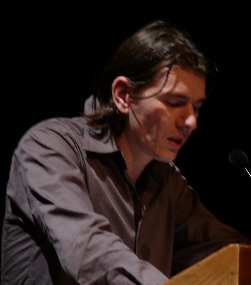 Dimitri Verhulst is de auteur van 'De helaasheid der dingen', waarmee hij niet alleen de publieksprijs van de De Gouden Uil Literatuurprijs won, maar meer recent ook de Inktaap. Dat is een prijs die wordt uitgereikt door Nederlandse en Vlaamse jongeren, die een keuze maken uit drie recente, prijswinnende boeken.